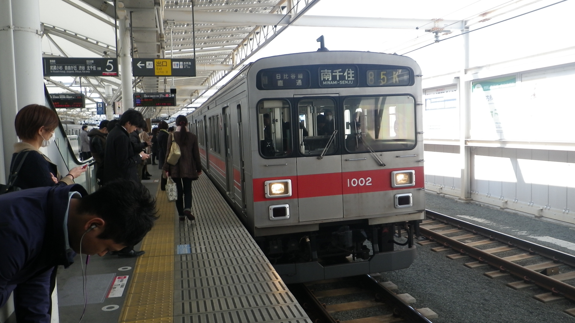 種別幕に「日比谷線直通」を表示する東急1000系